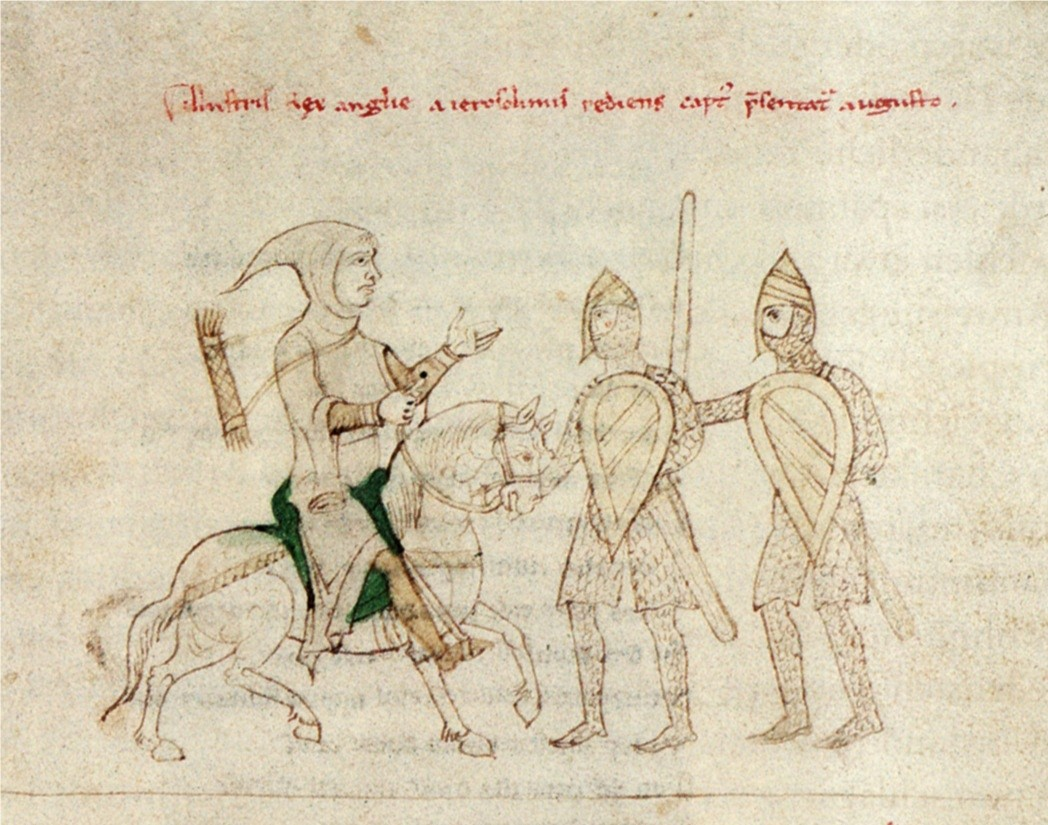 Gefangennahme von Richard Löwenherz in Erdberg bei Wien. Ausschnitt aus einer Seite des Liber ad honorem Augusti sive de rebus Siculis des Petrus de Ebulo (fol. 129 recto)